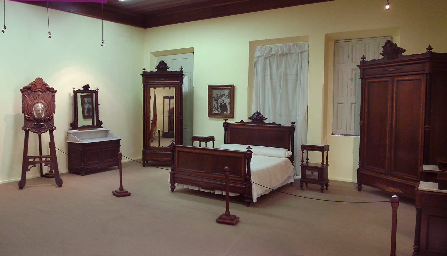 Interior do Museu Julio de Castilhos, Porto Alegre, Brasil. Reconstituição do dormitório de Julio de Castilhos no prédio que foi sua última residência.